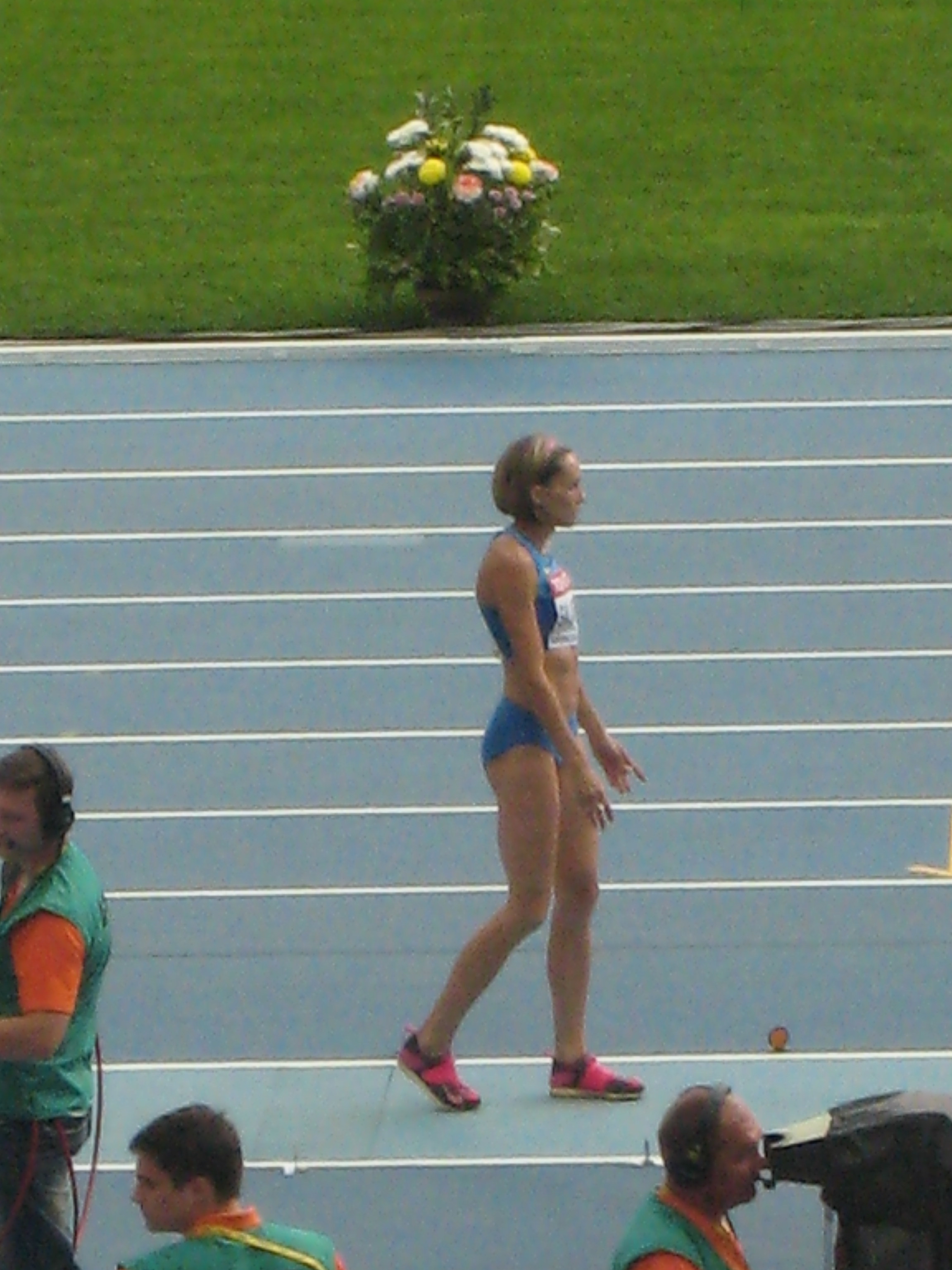 Чемпионат мира по лёгкой атлетике 2013. Украинская спортсменка Ольга Саладуха